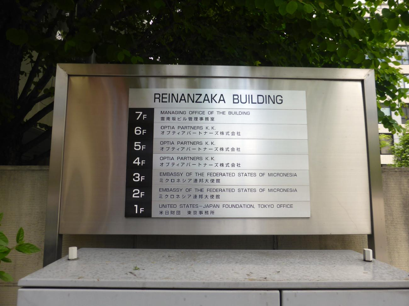 ミクロネシア大使館は2Fと3F